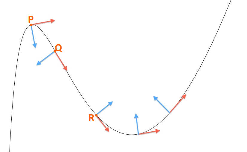 Curvatura em três diferentes pontos de uma curva.